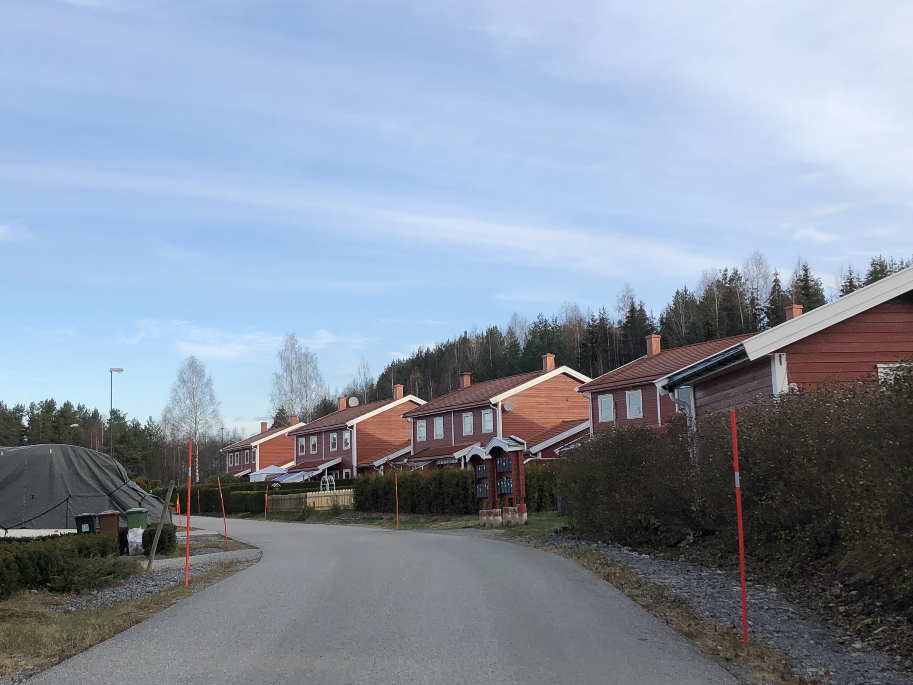 Tandbergsvingen, Hønefoss